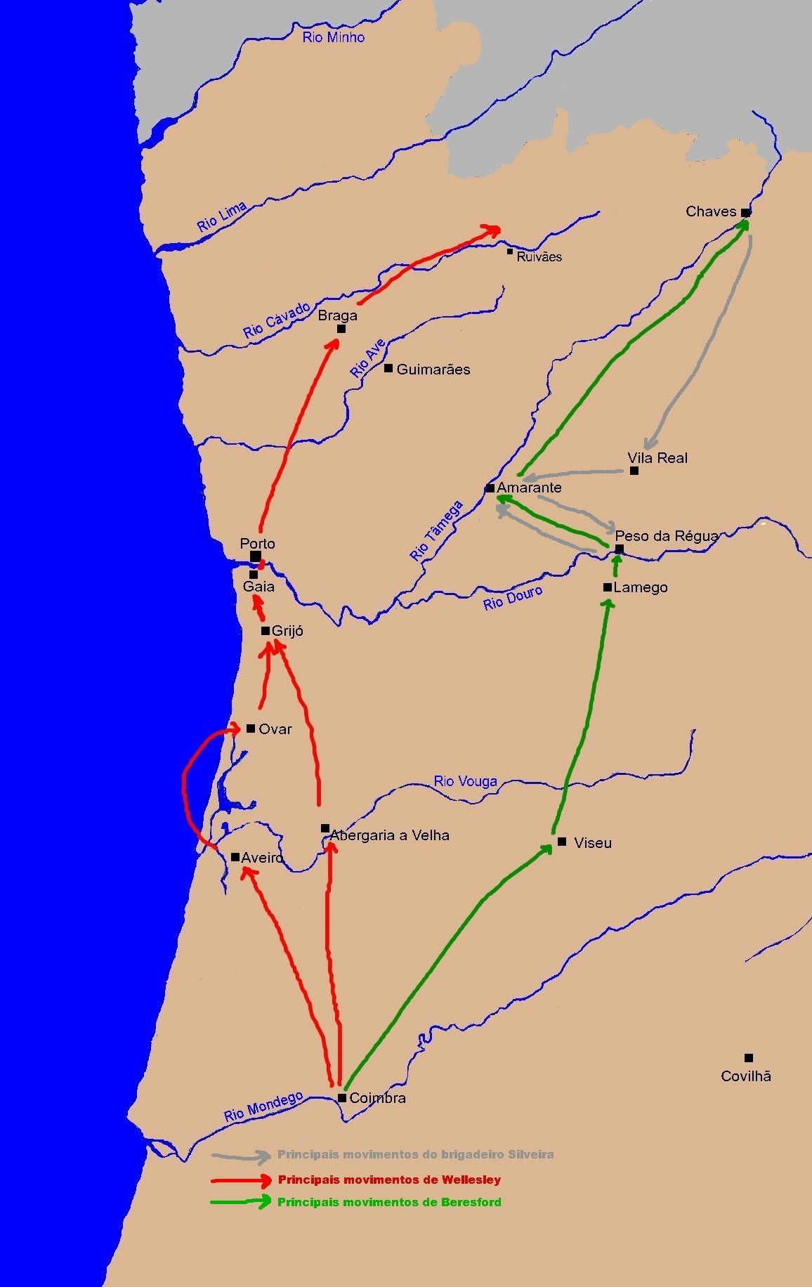 Pincipais movimentos das forças anglo-lusas durante a Segunda Invasão Francesa de Portugal